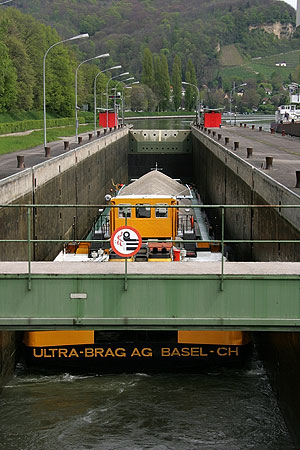 Schleuse von Birsfelden